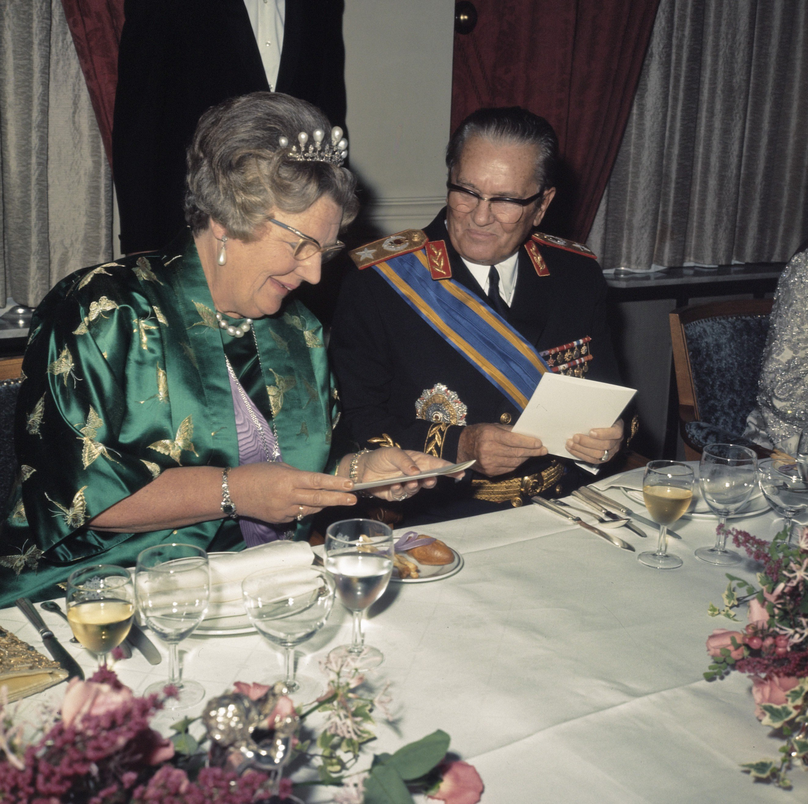 Collectie / Archief : Fotocollectie Anefo Reportage / Serie : Staatsbezoek van President Tito aan Nederland Beschrijving : Nederlandse regering biedt President Tito en echtgenote galadiner aan in Amstel Hotel, Amsterdam; koningin Juliana en President Tito aan tafel Datum : 22 oktober 1970 Locatie : Amsterdam, Noord-Holland Trefwoorden : aankomsten, galadiners, staatsbezoeken Persoonsnaam : Juliana (koningin Nederland), Juliana, koningin, Tito, Josip Broz Instellingsnaam : Amstel Hotel Fotograaf : Koch, Eric / Anefo Auteursrechthebbende : Nationaal Archief Materiaalsoort : Dia (kleur) Nummer archiefinventaris : bekijk toegang 2.24.01.07 Bestanddeelnummer : 254-8730